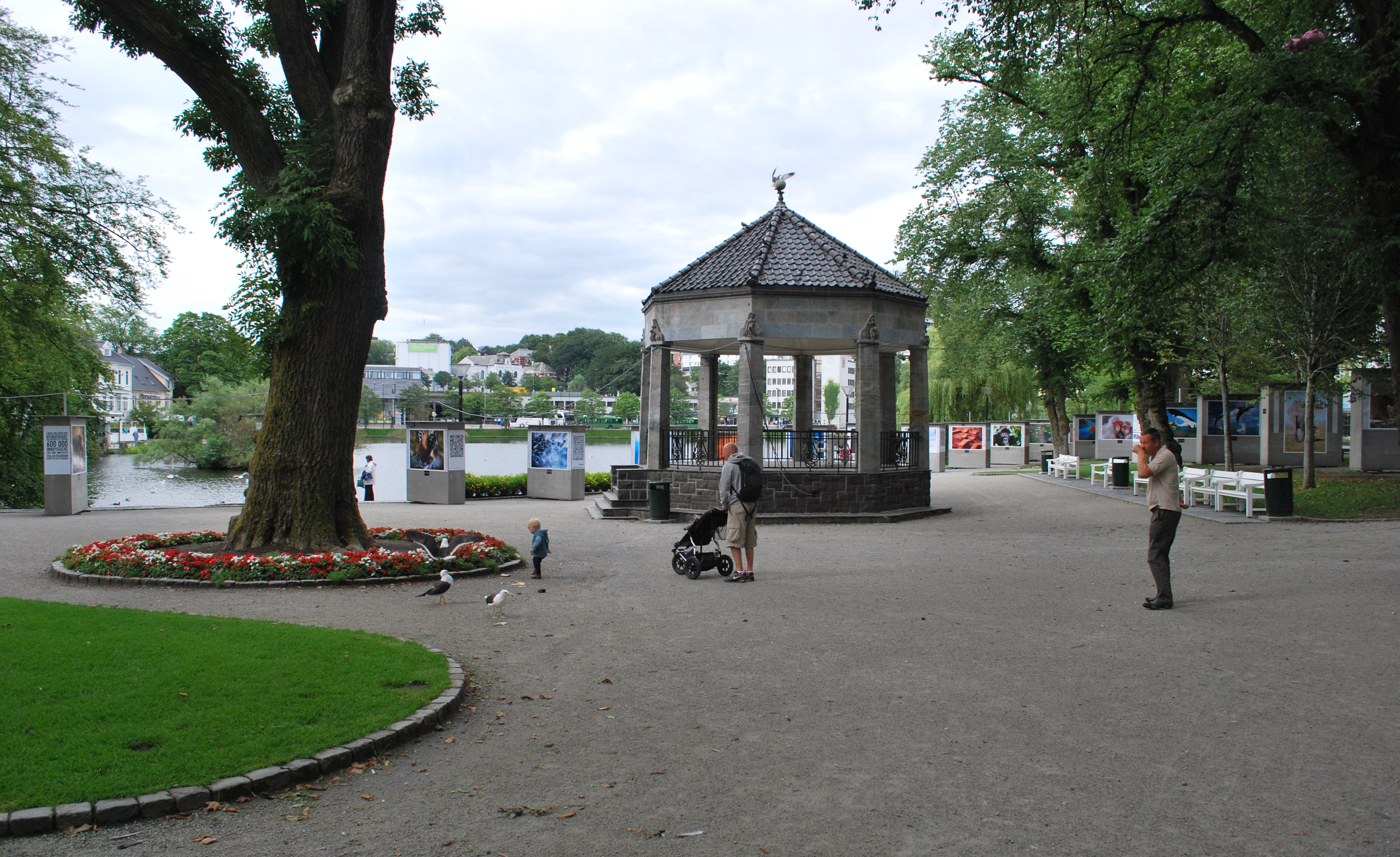 Byparken, Stavanger, Norway